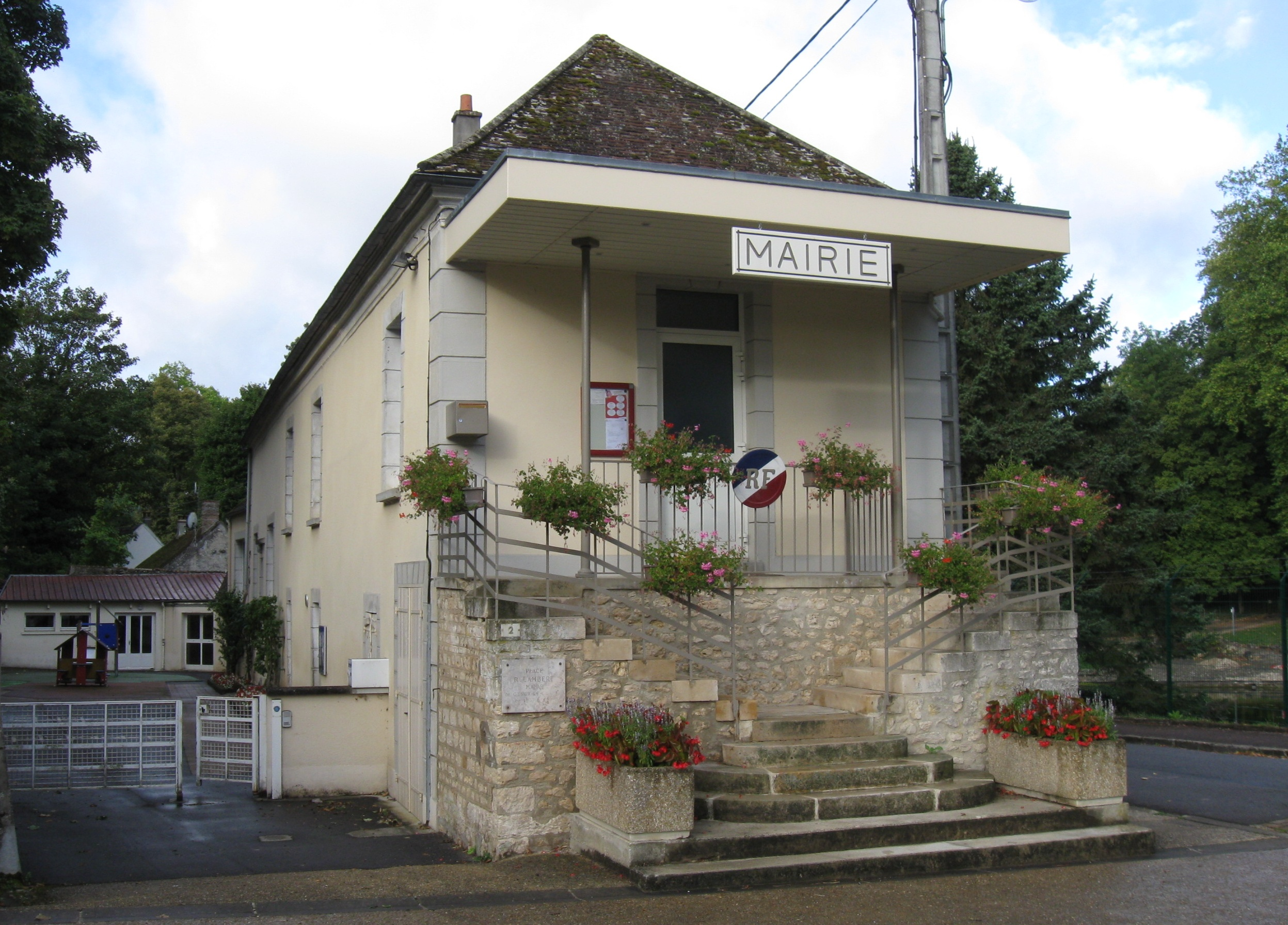 Mairie de Gurcy-le-Châtel. (Seine-et-Marne, région Île-de-France).